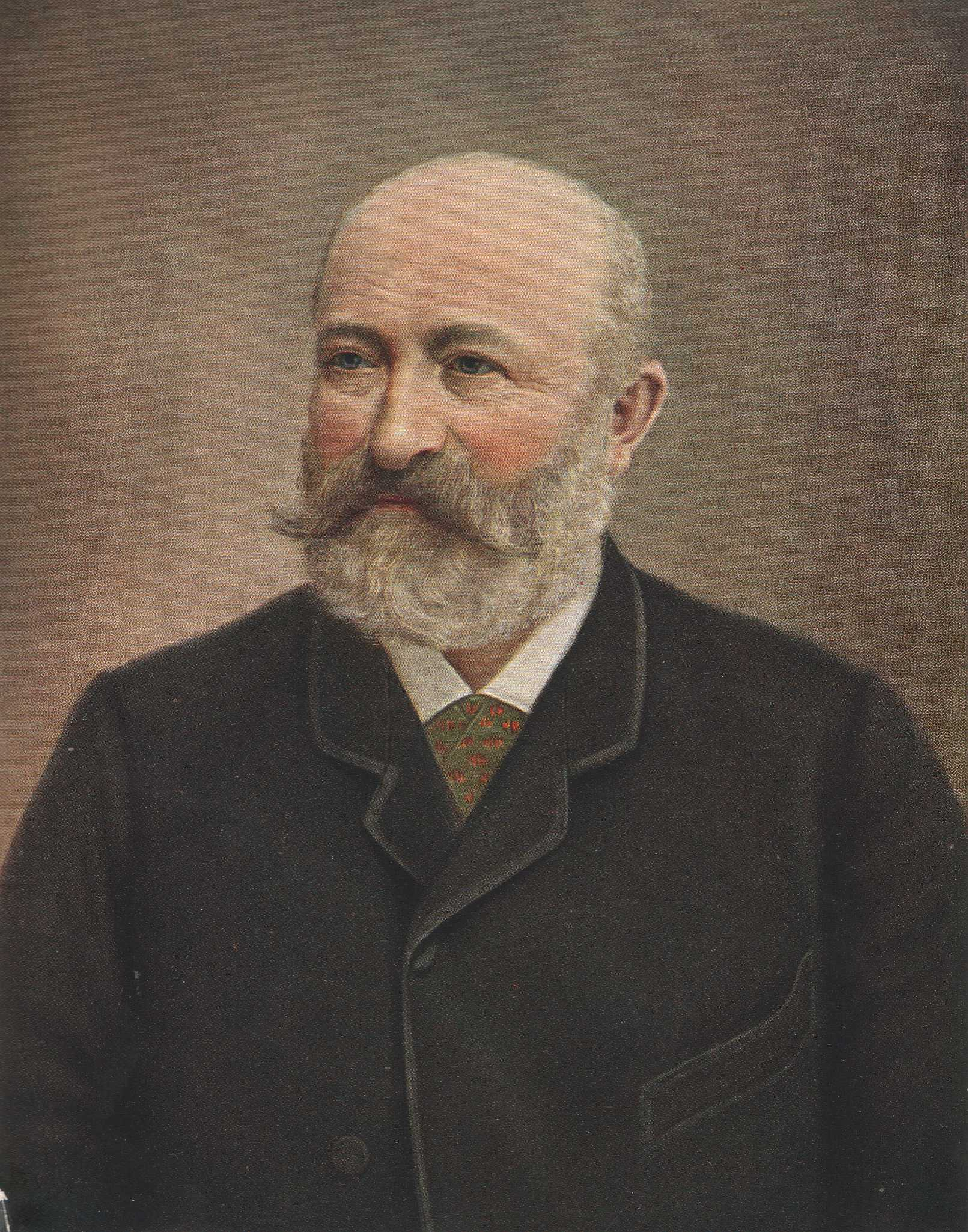 Theodor Thorer, Rauchwarenhändler und Pelzveredler in Leipzig